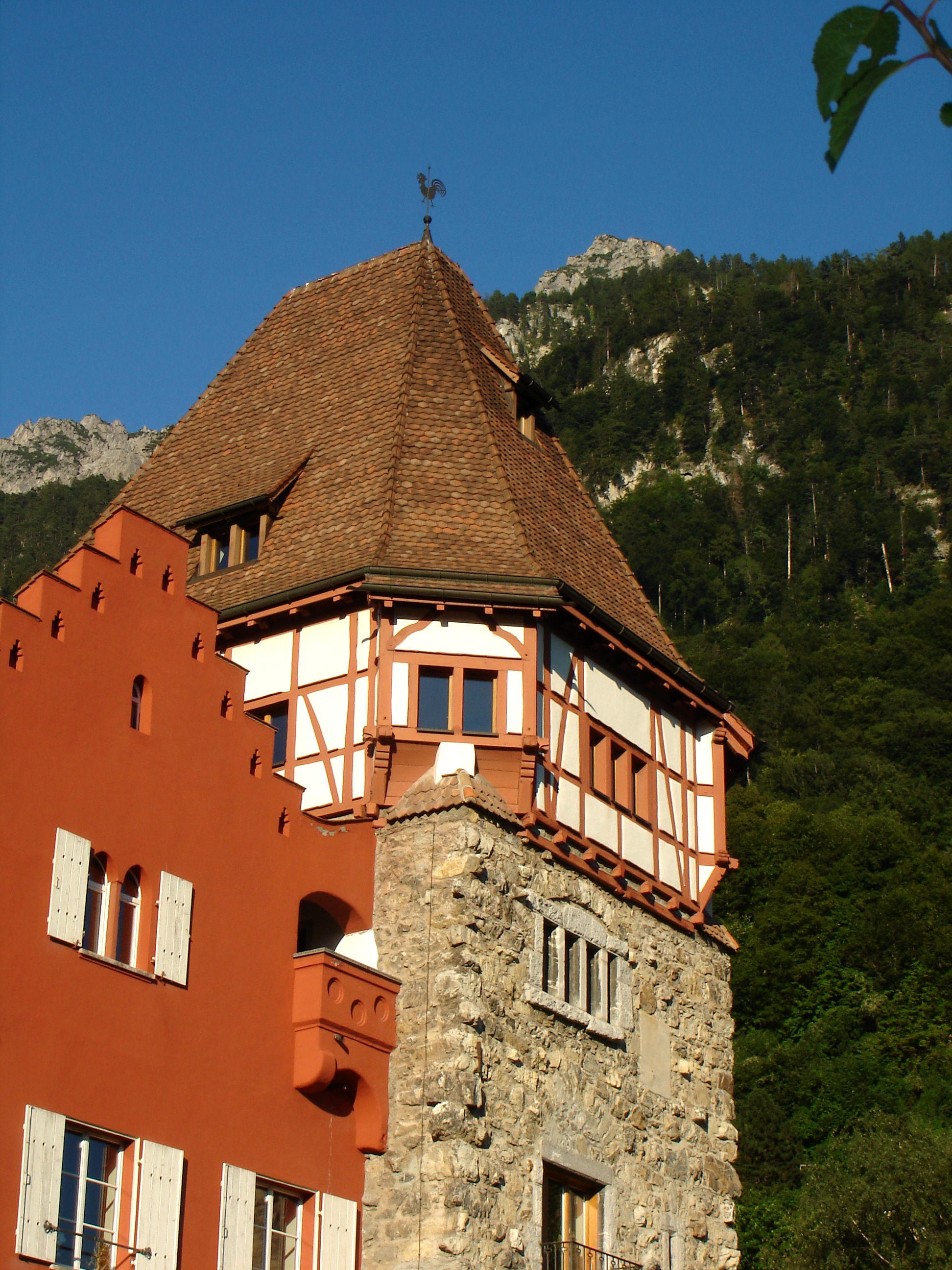 Liechtenstein: Vaduz